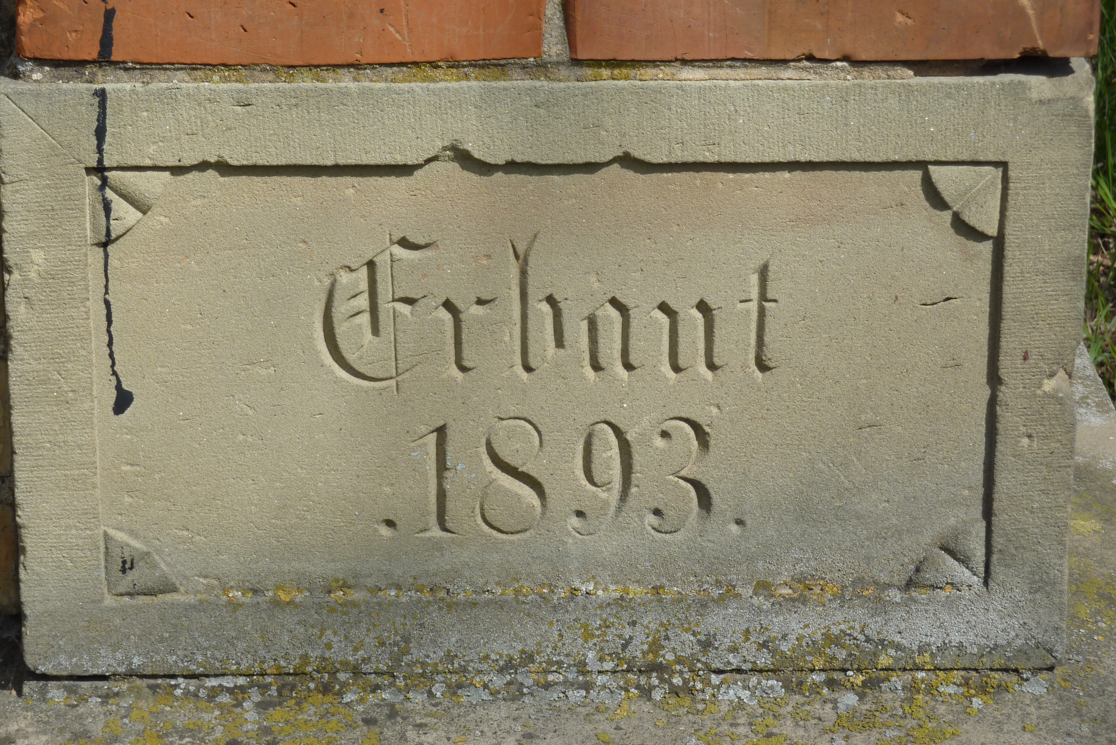 Grundstein der profanierten Synagoge in Steinsfurt, Stadtteil von Sinsheim